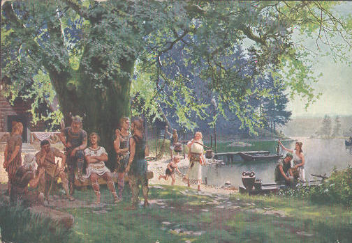 Nachbildung von Meinholds Schulbildern nach einem Gemälde von Michael Zeno Diemer